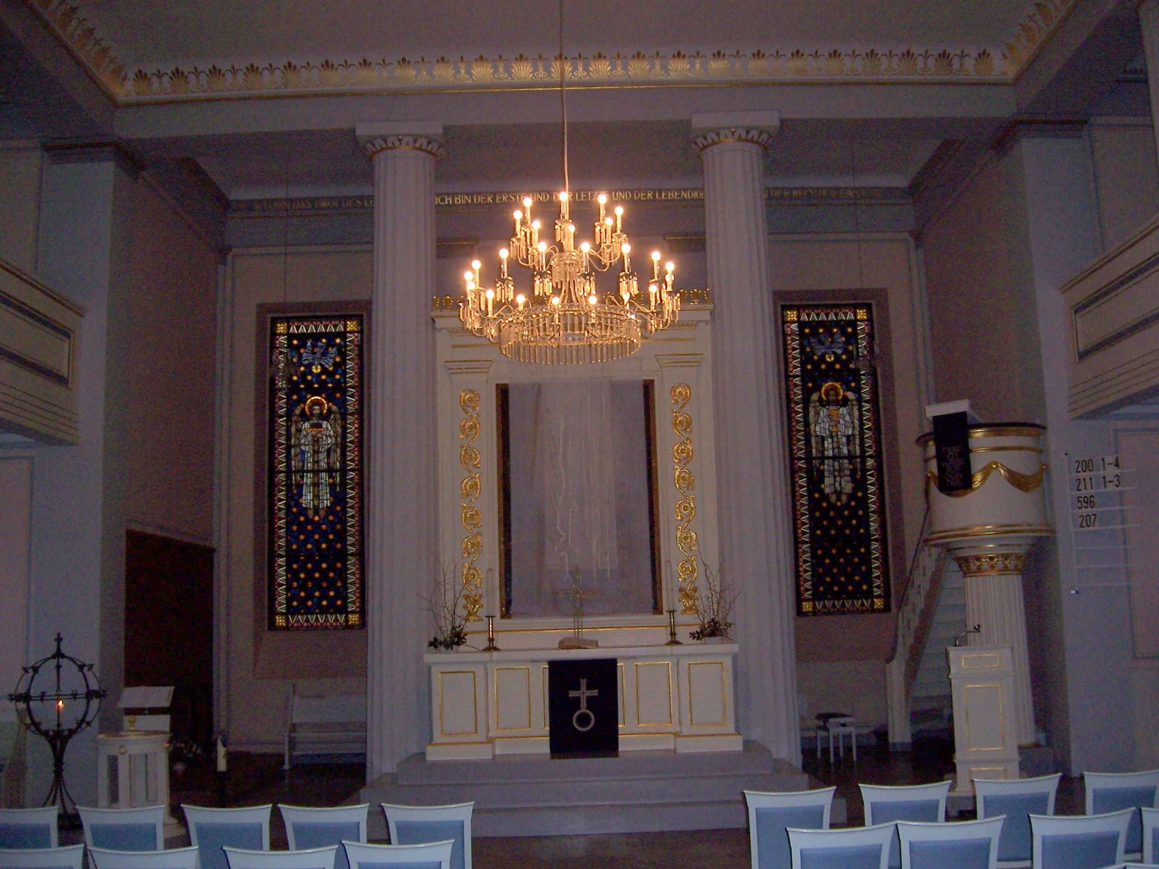 Klassizistische Inneneinrichtung der ev. Auferstehungskirche Arnsberg